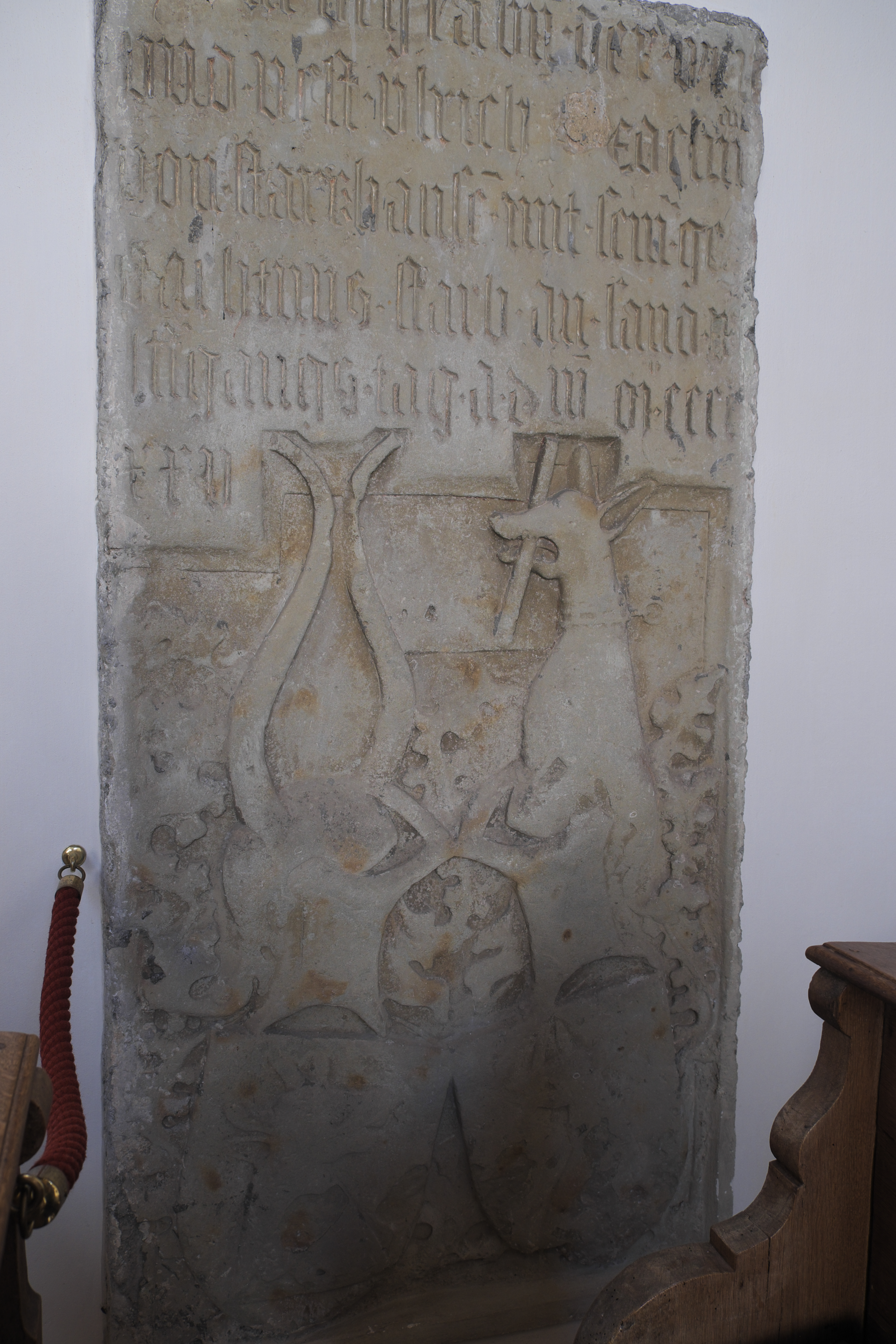 Katholische Pfarrkirche Mariä Heimsuchung in Gosseltshausen (Wolnzach) im Landkreis Pfaffenhofen an der Ilm (Bayern/Deutschland), Grabstein